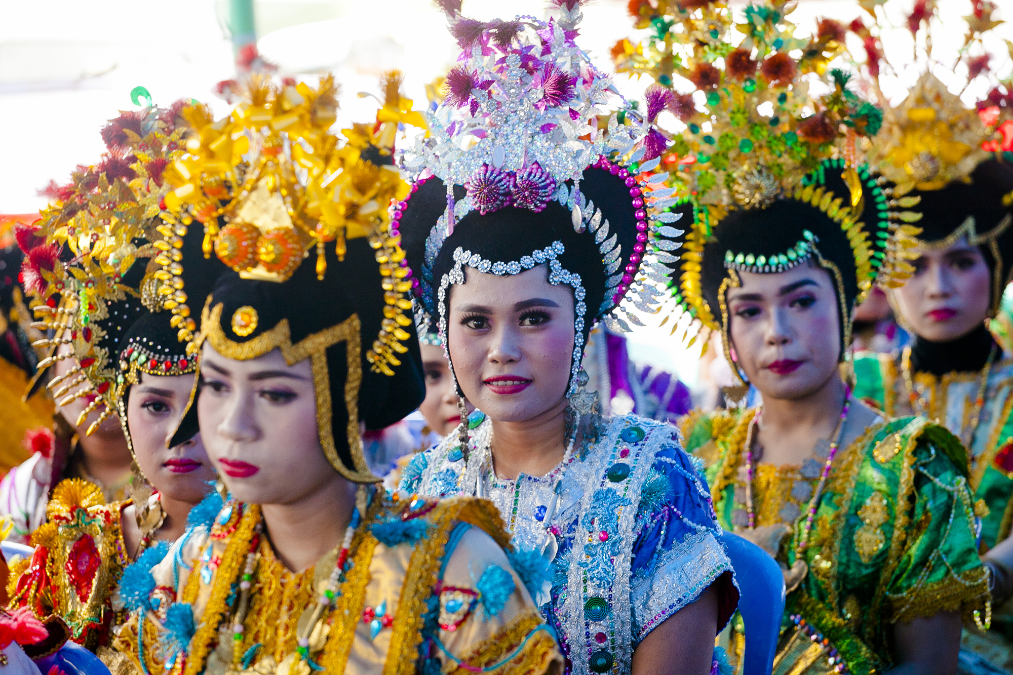 Tradisi posuo (pingitan) dalam masyarakat buton, sulawesi tenggara, dilakukan kepada anak perempuan yang telah beralih status dari gadis remaja (kabua-bua) menjadi gadis dewasa (kalambe) dan ini wajib diikuti wanita berdarah buton sebelum menikah. Saat seorang gadis melaksanakan posuo, ia akan diisolasi dan dijauhi dari berbagai pengaruh dunia luar. Sang gadis hanya dapat berhubungan orang yang ditujuk langsung oleh pemangku adat (bhisa) untuk memberikan berbagai wejangan khusus selama masa posuo dilaksanakan.